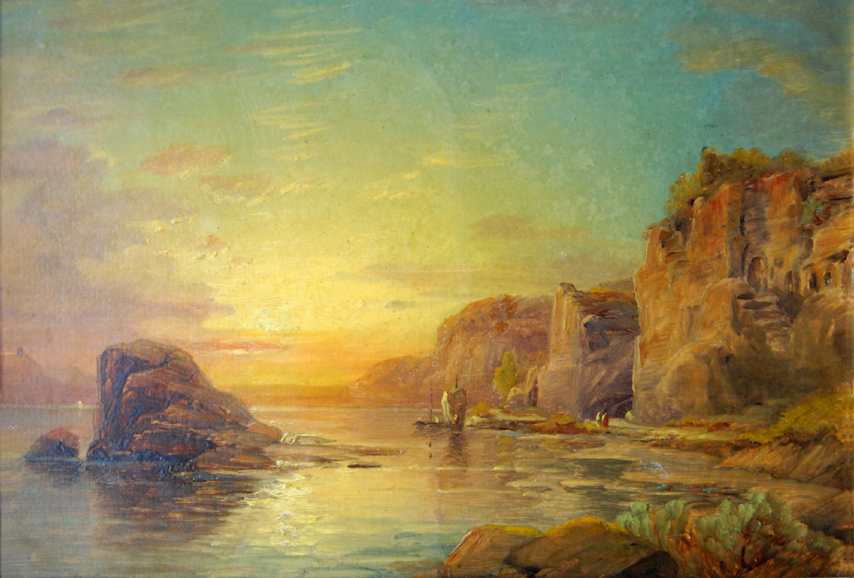 Heroische Landschaft (Bodenseeufer mit den Goldbacher Heidenhöhlen)